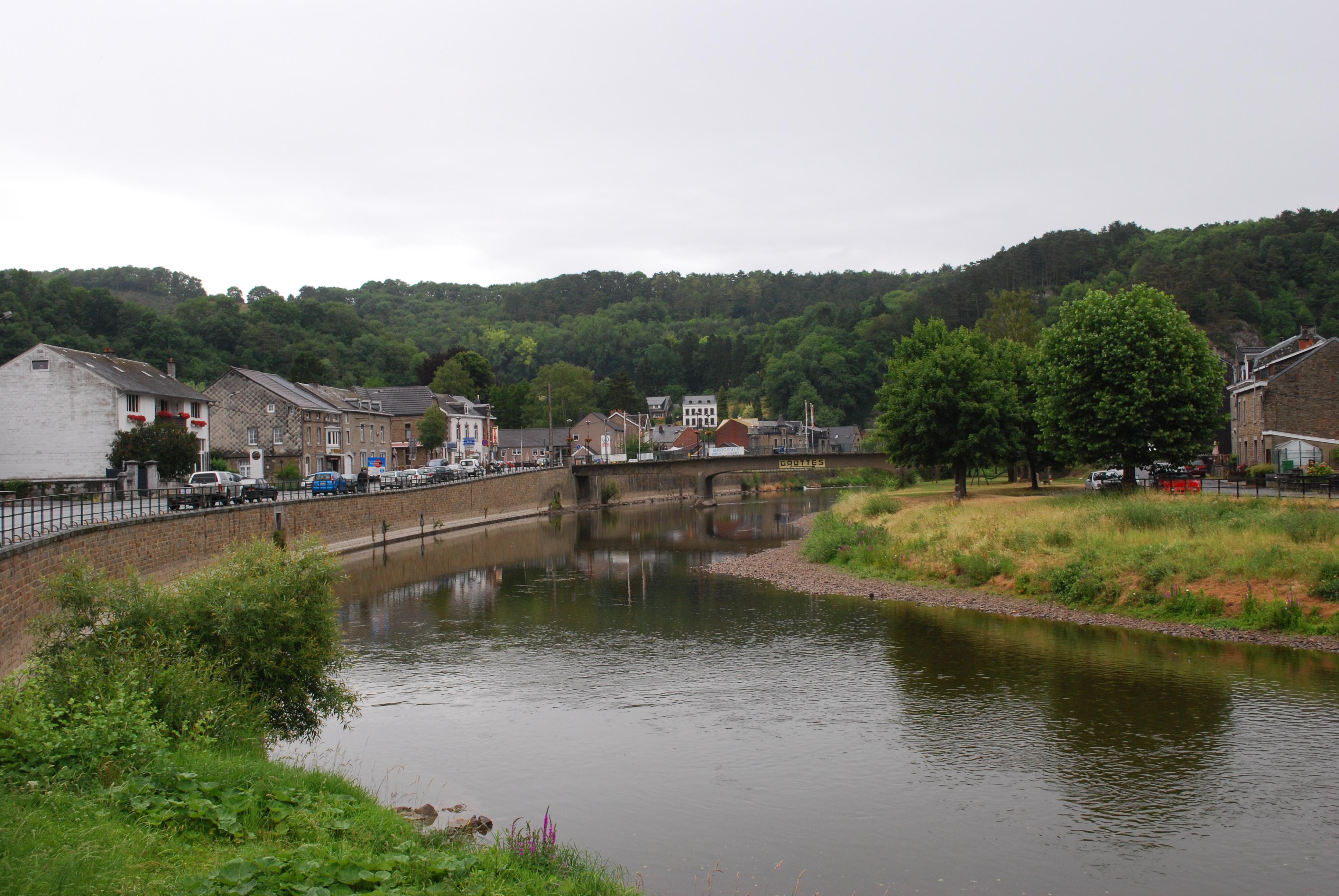 Comblain-au-Pont : quai de l'Ourthe, et vue sur l'Ourthe vers l'aval.